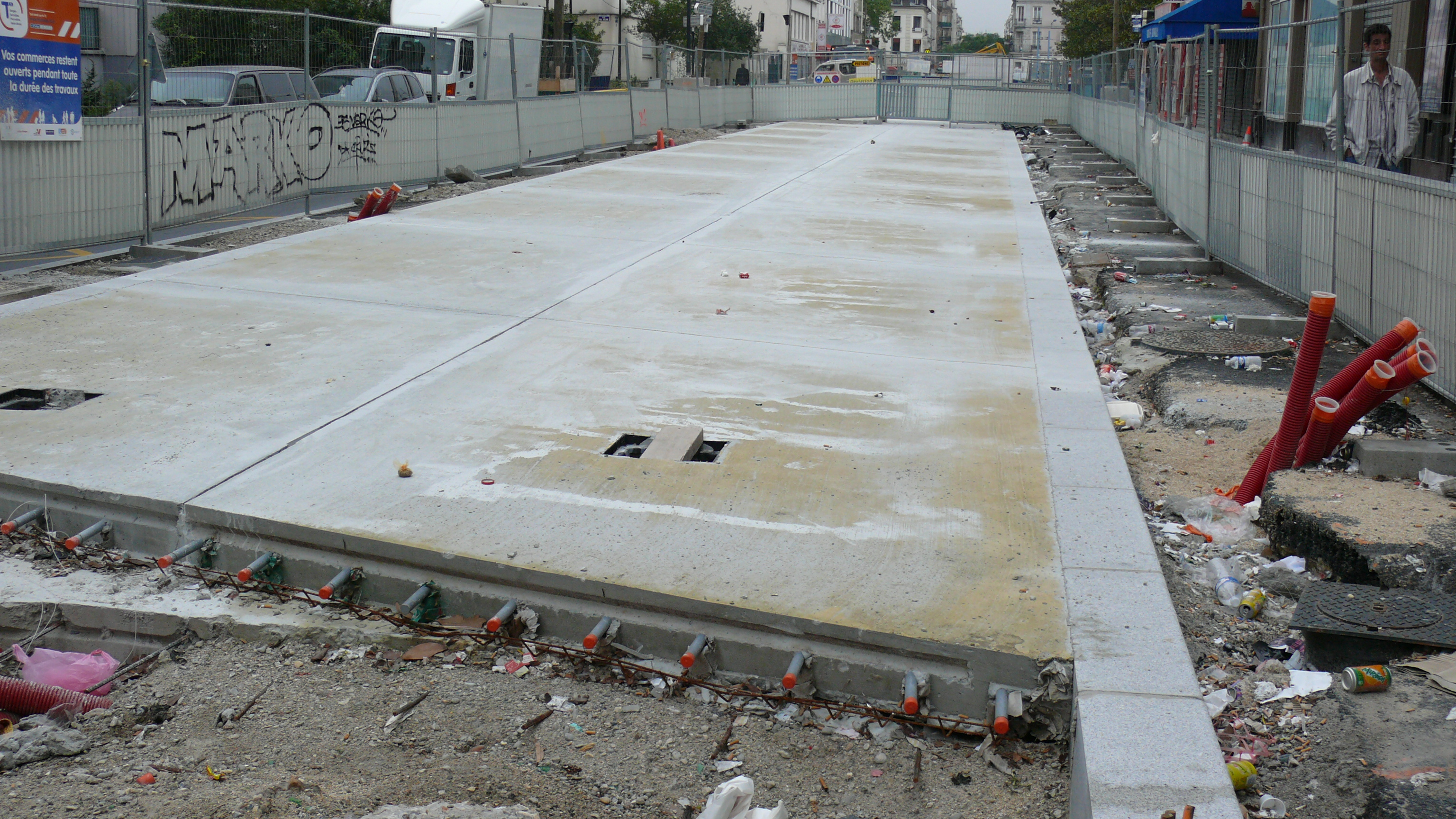 Construction de la plate-forme en béton-armé du Tramway T5 à Saint-Denis